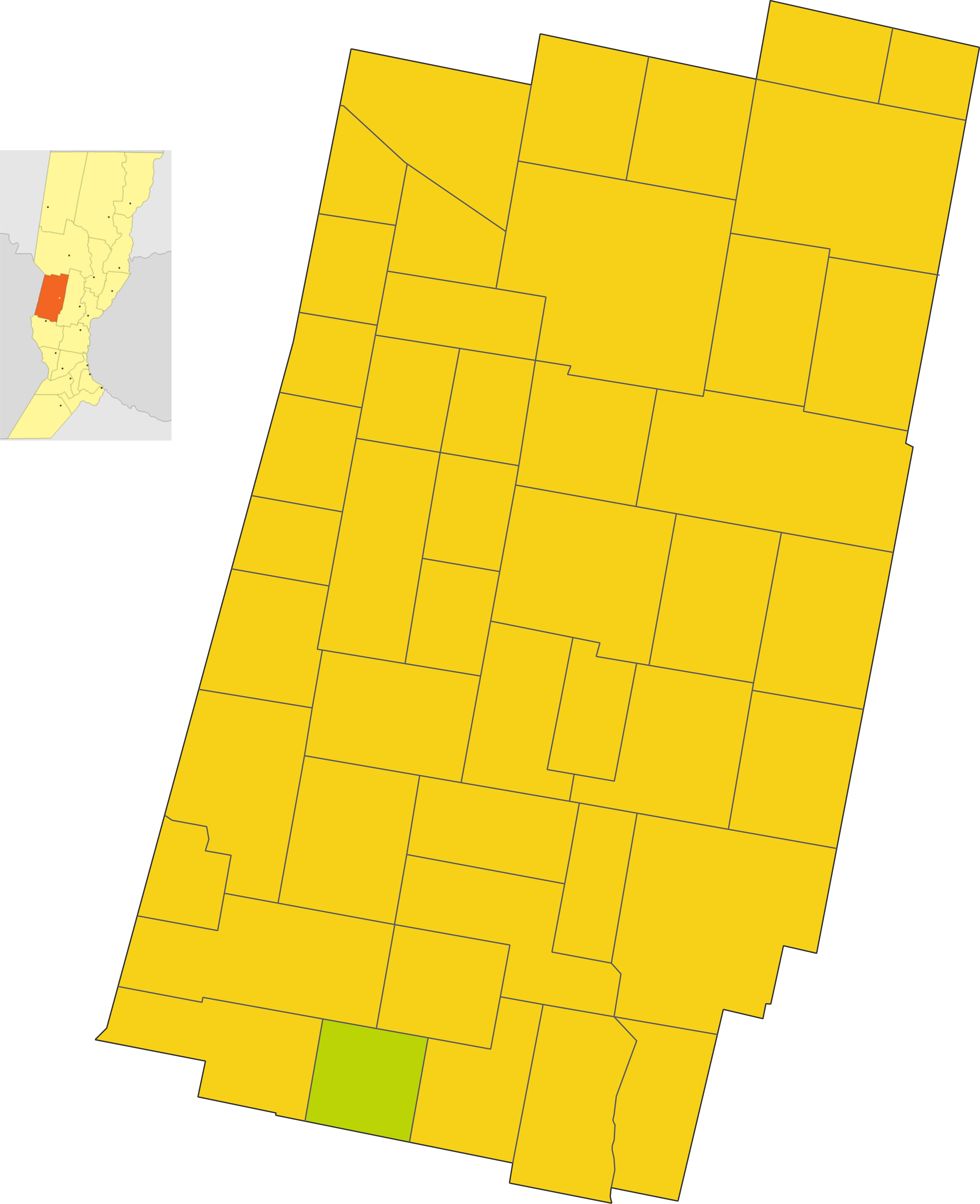 Map of the comuna de Garibaldi in Castellanos department, Santa Fe province,Argentina